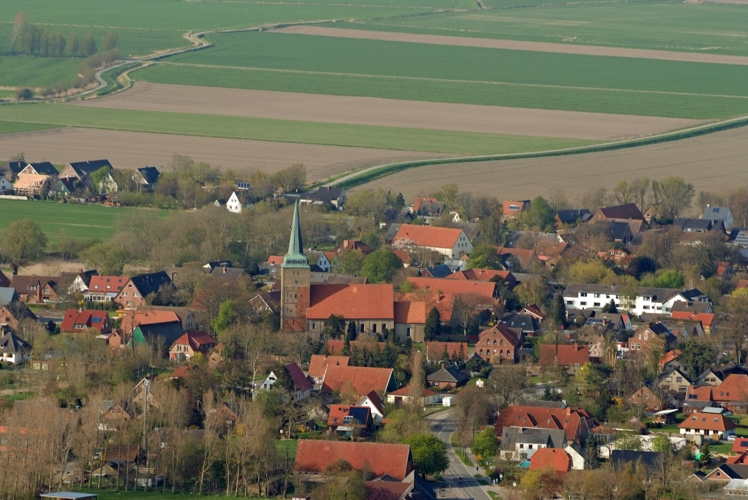 Willehadi-Kirche in Wremen / Fotoflug von Nordholz-Spieka nach Oldenburg und Papenburg